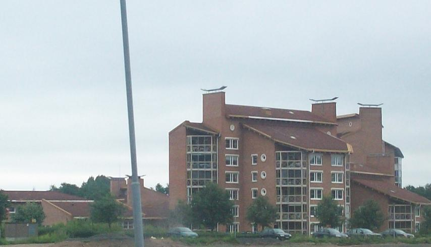 Käpplunda Gärde i Skövde